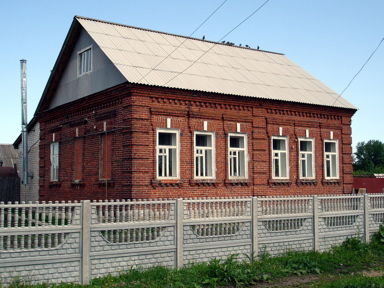 Кирпичный дом кон. XIX — нач. XX вв. в с. Алёшино (быв. д. Ишеева Гора), Рязанская область, Россия